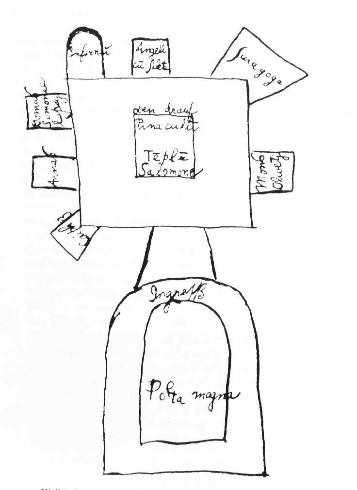 Vigil Raber Passionsspiel Bozen 1514